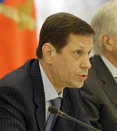 Александр Жуков на заседании Совета по реализации приоритетных национальных проектов и демографической политике. Москва, Кремль